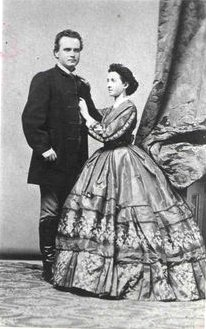 Szerdahelyi Kálmán (1829-1872) és második felesége, Prielle Kornélia (1826-1906)